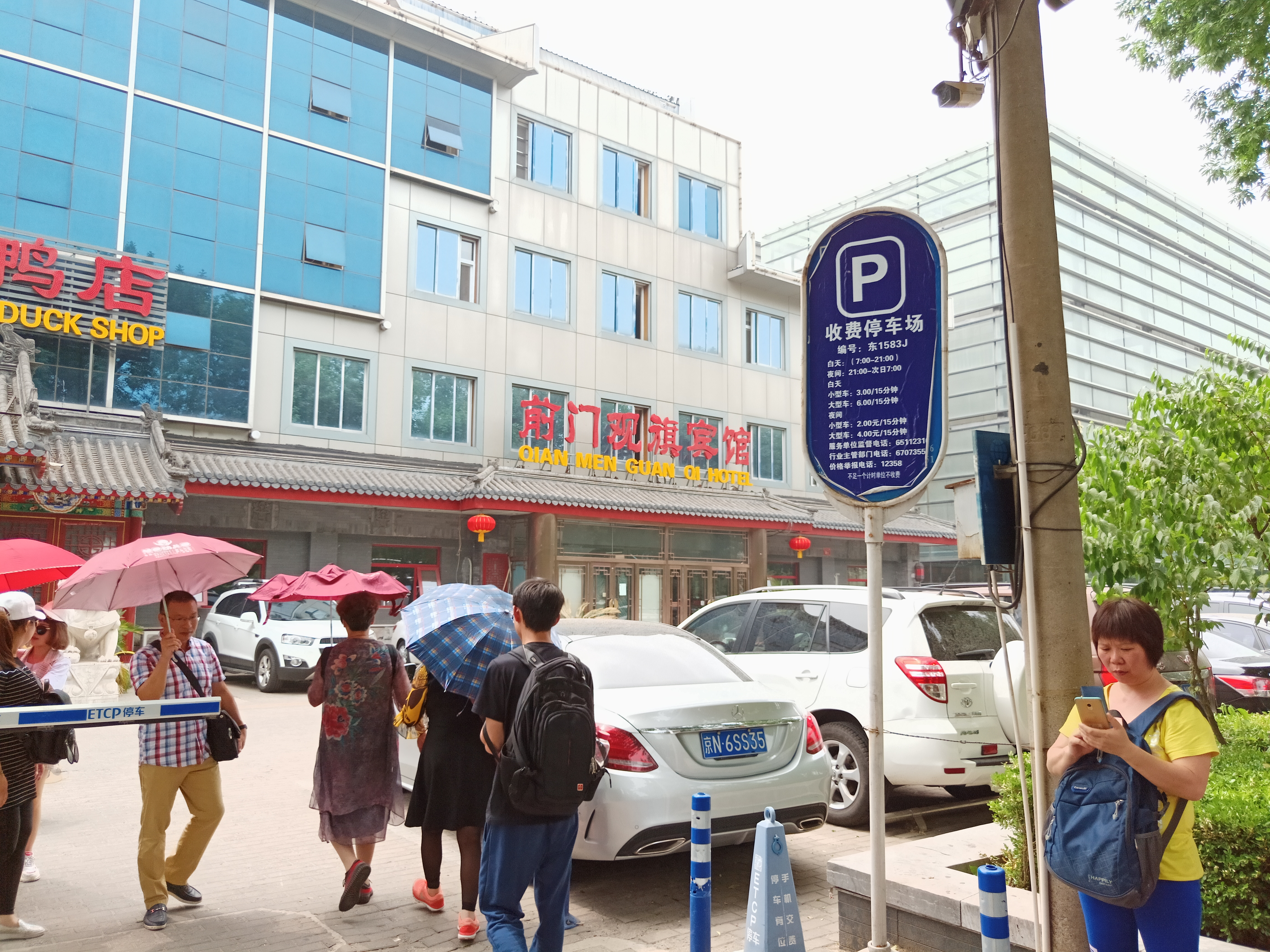 粵語: 前門觀旗賓館